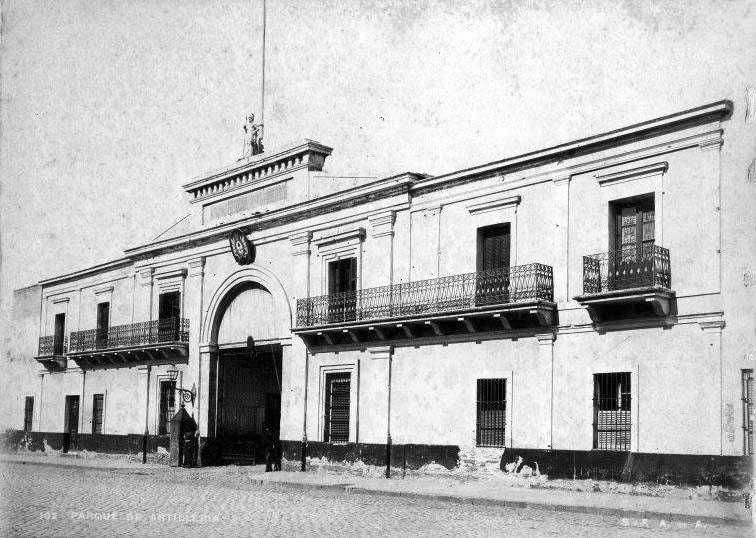 Parque de Artillería de Buenos Aires, ubicado en la calle Talcahuano, frente a la actual Plaza Lavalle. Demolido hacia 1900, hoy su lugar es ocupado por el Palacio de Tribunales.